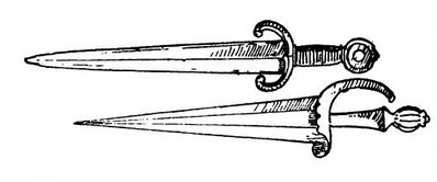 Бракемары - рисунок №25 из книги Э. Кастла "Школы и мастера фехтования : Благородное искусство владения клинком".